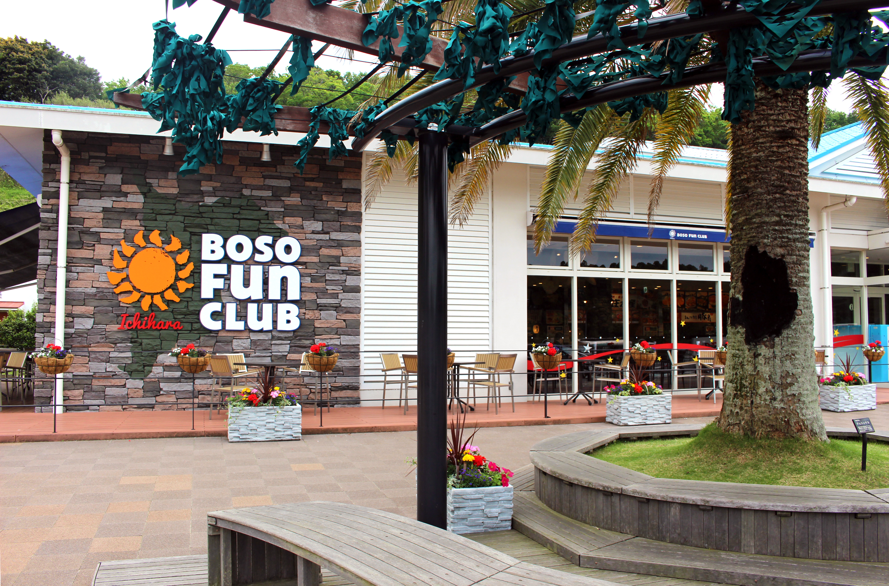 市原SA下り